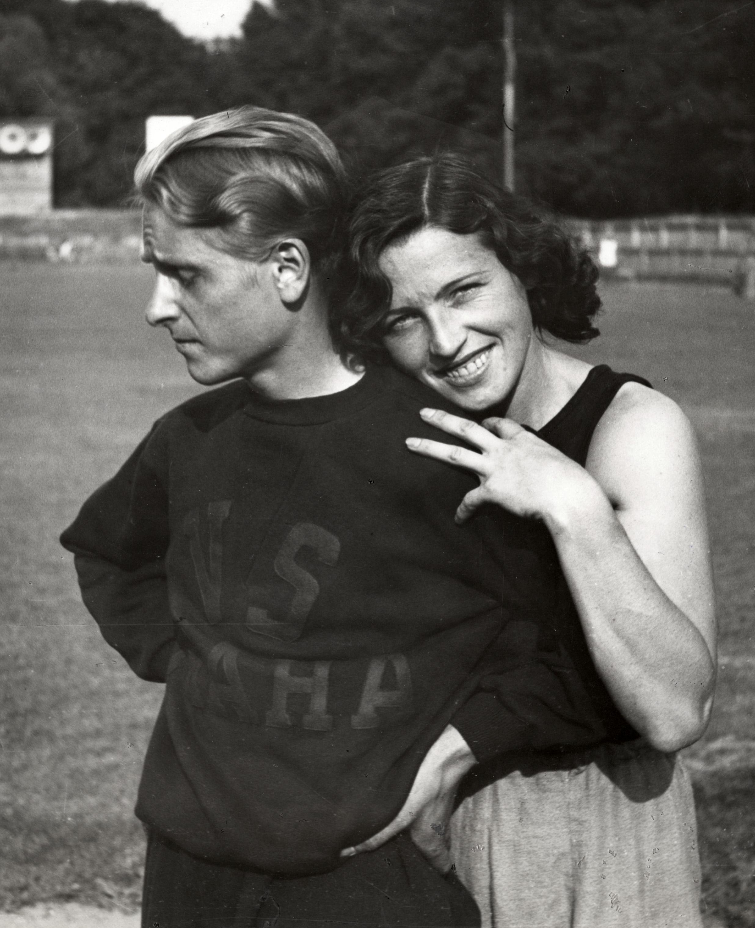 Transsexualiteit. De Tsjechische atlete Zdenka Koubkova, die twee wereldrecords op haar naam heeft staan, heeft kort geleden verklaard, dat zij voortaan als man wenst te worden beschouwd en heeft de naam Benek Kubek aangenomen. Foto: Zdenka Koubkova en de Oostenrijkse atlete Kohlbach.